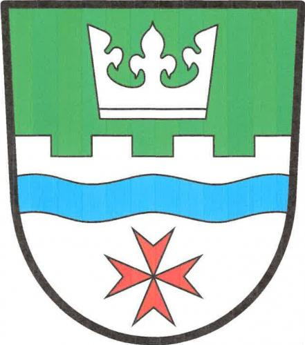 Karlík znak